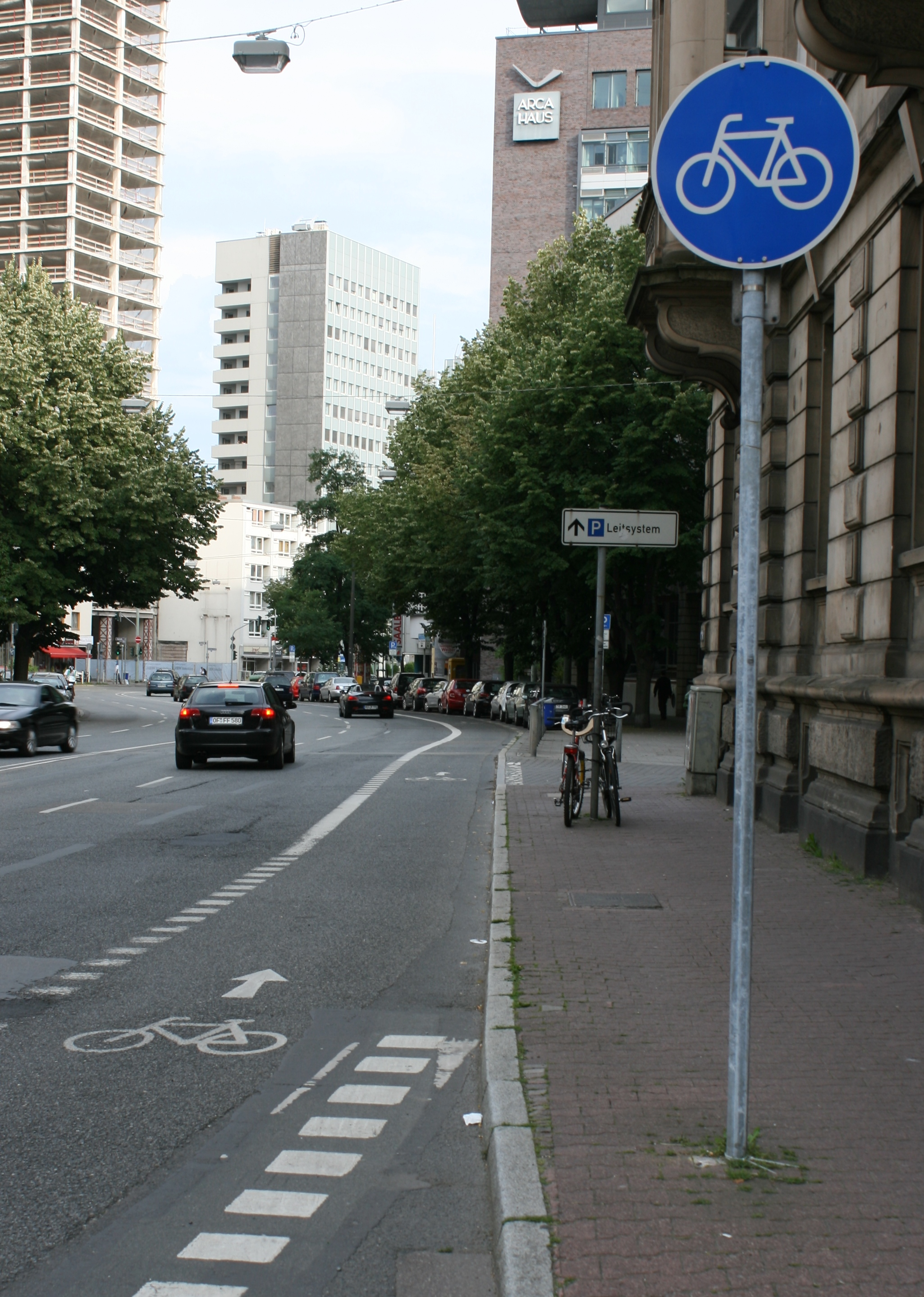 Radfahrstreifen, Eschersheimer Landstraße/Grüneburgweg, Frankfurt